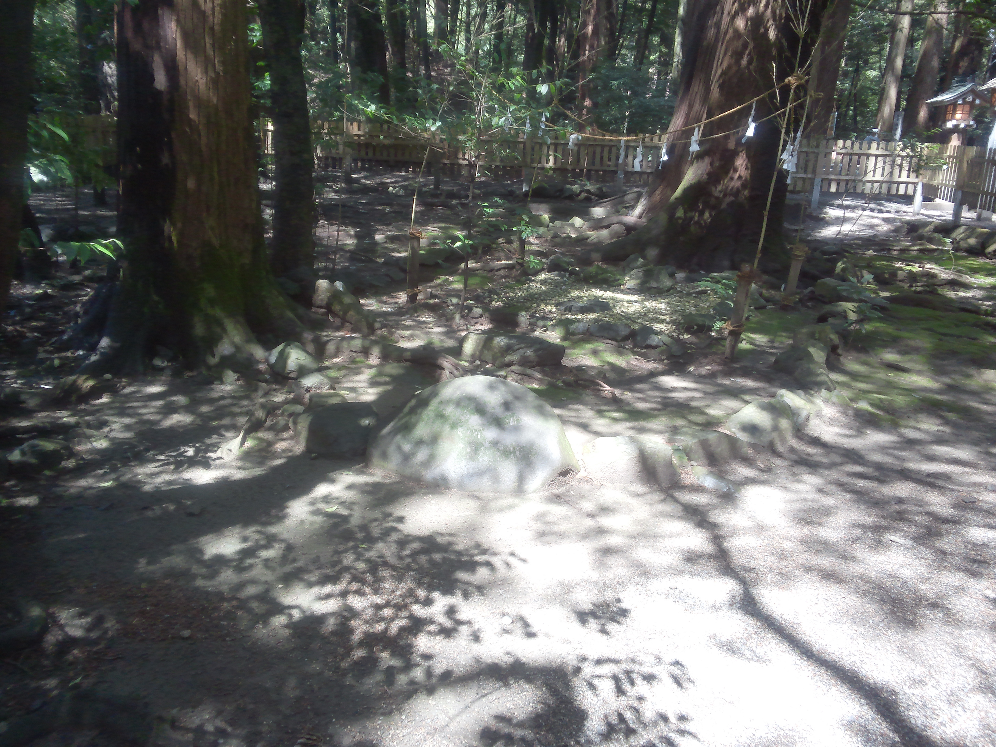 椿大神社 - 御船磐座（みふねいわくら）